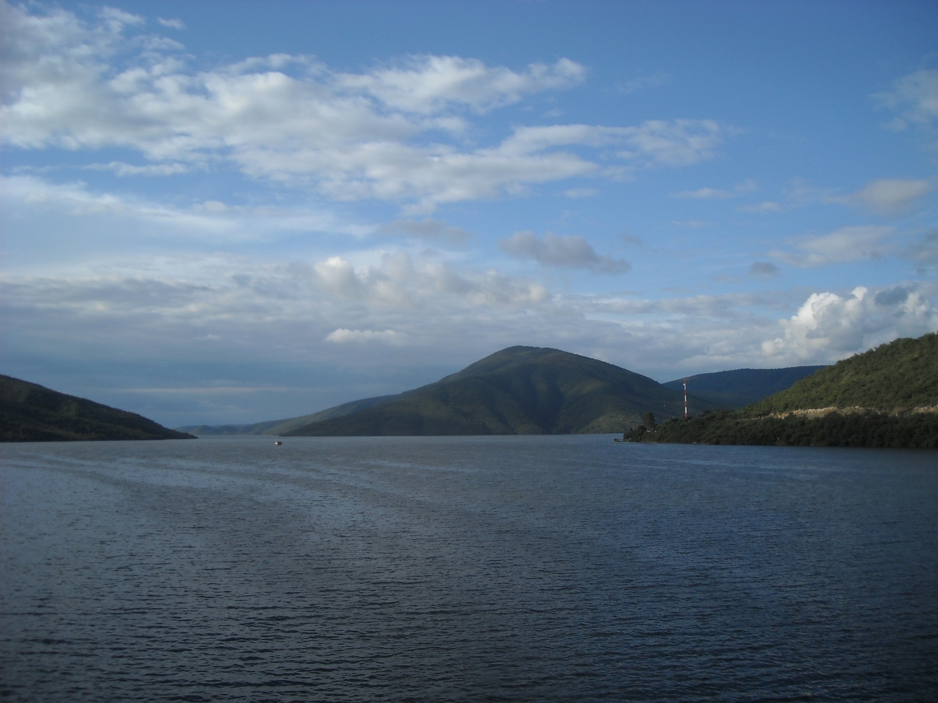 Embalse Cabra Corral desde el puente